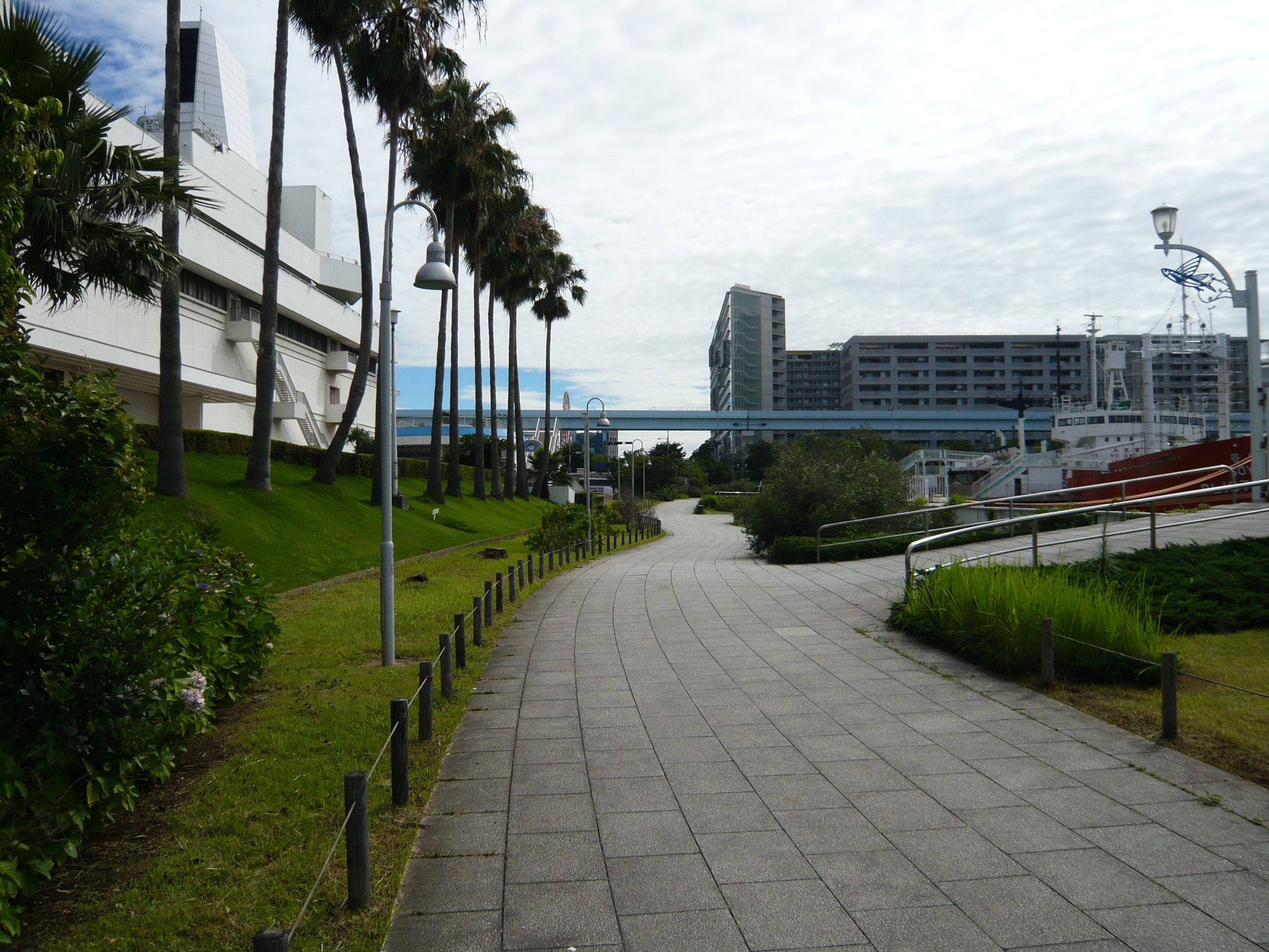 東八潮緑道公園（東京都品川区東八潮(お台場)） East Yashio Park(Higashi-Yashio-Ryokudoukouen,東八潮緑道公園) in Shinagawa-ku,Tokyo,Japan.